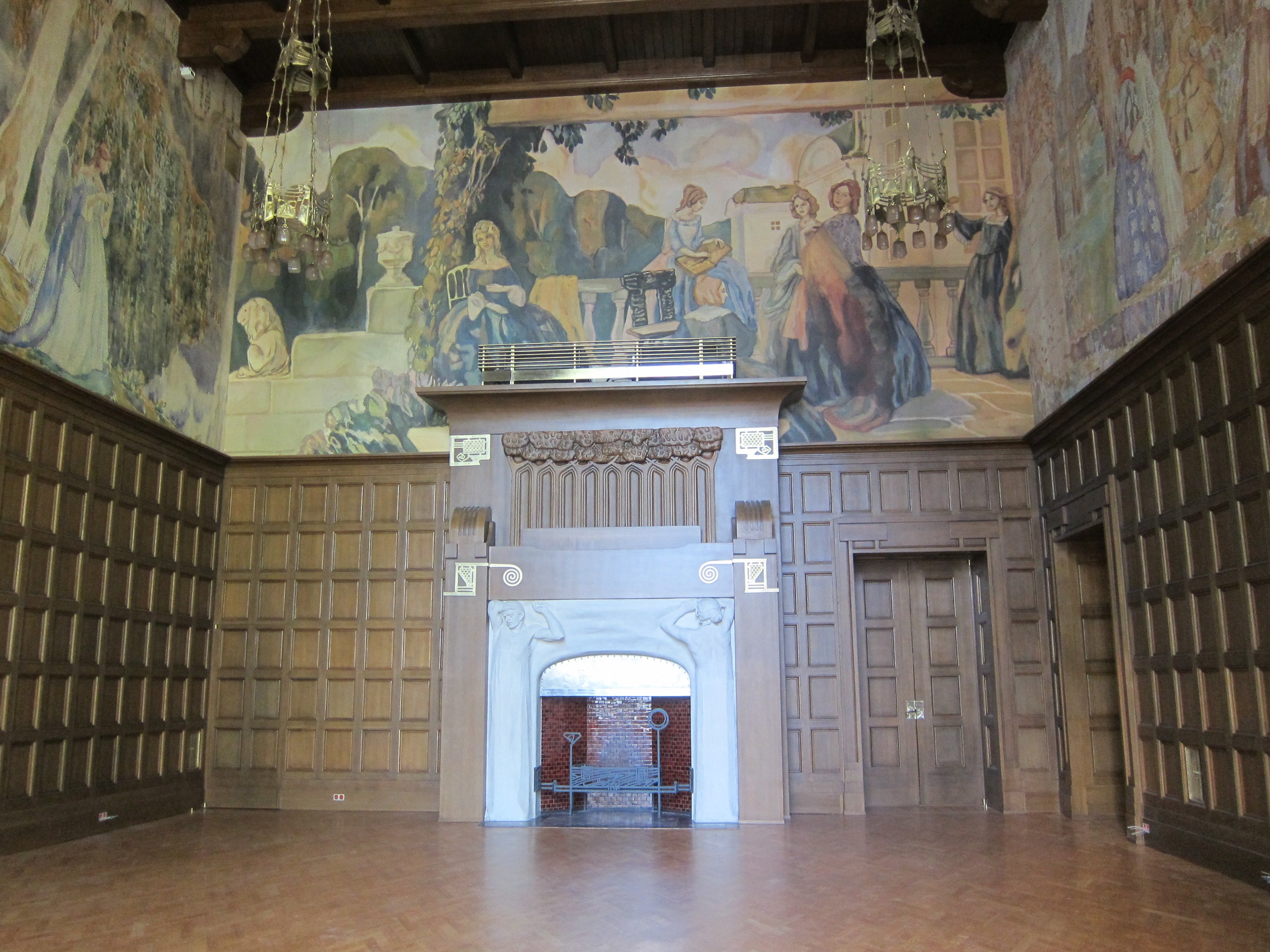 Восстановленное панно В. Э. Борисова-Мусатова в московском особняке А. И. Дерожинской под адресу Кропоткинский переулок, 13, стр. 1. Настенная живопись выполнена при реставрации 2013 года, проект которой получил гран-при на конкурсе "Московская реставрация"